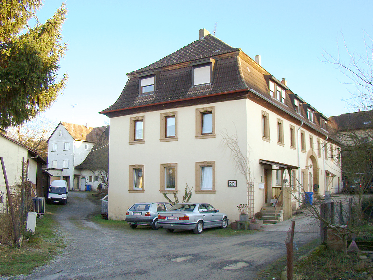 Einer der beiden erhaltenen Flügelbauten des Syndikus Jägerschen Baus in Bad Friedrichshall-Kochendorf, Binnetstr. 201